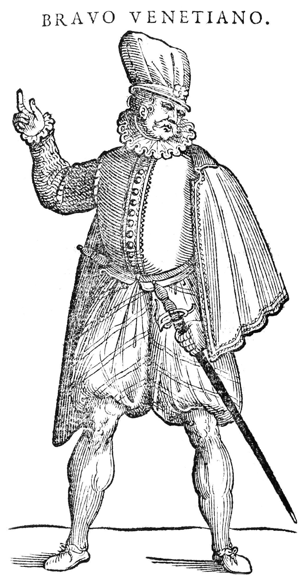 Bravo Venetiano